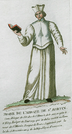 Collection de costumes de tous les ordres monastiques, supprimés à differentes époques, dans la ci-devant Belgique, Bruxelles, Philippe Joseph Maillart et sœur, 1811